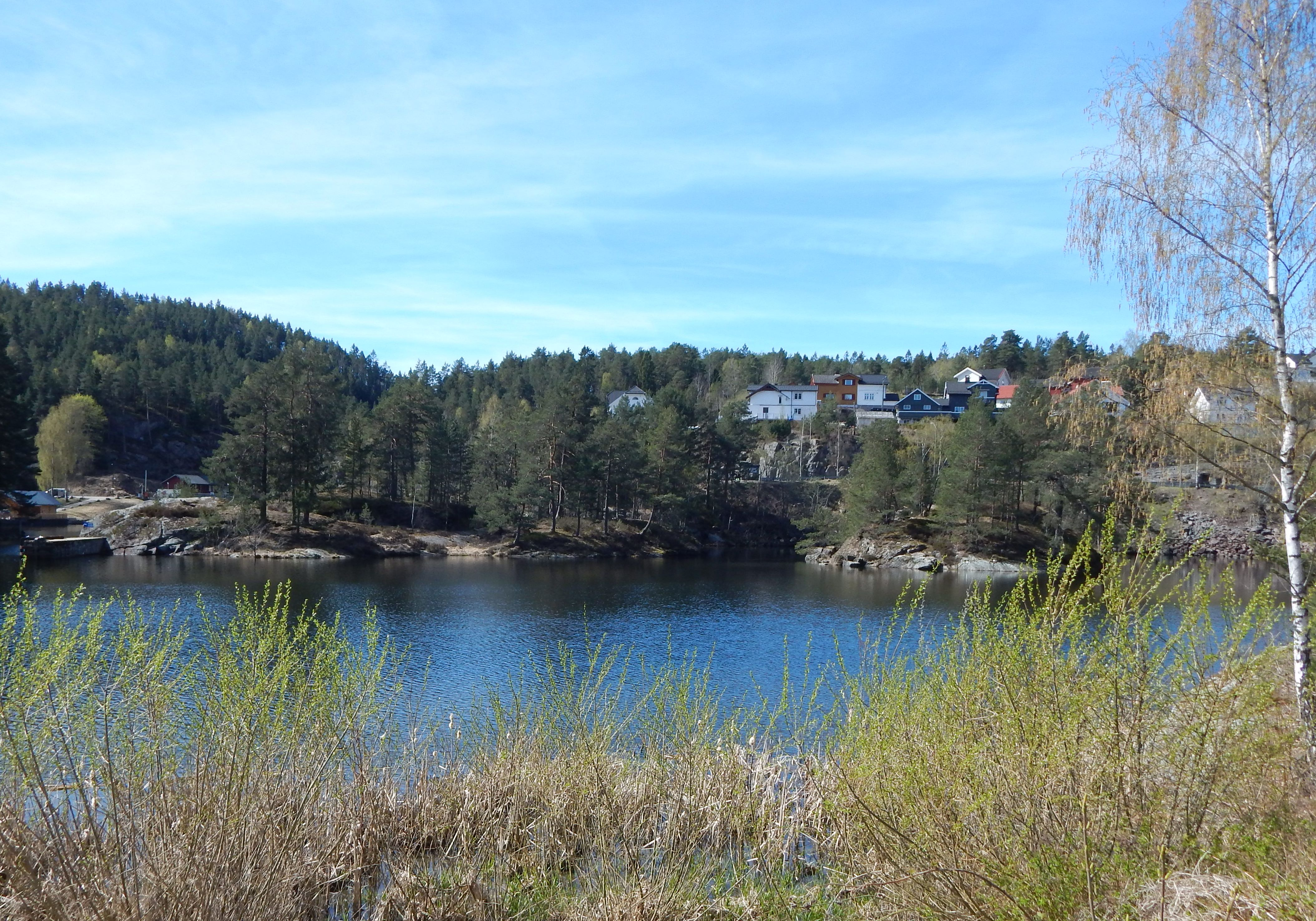 Bebyggelse ved Meierelva i Skotfoss